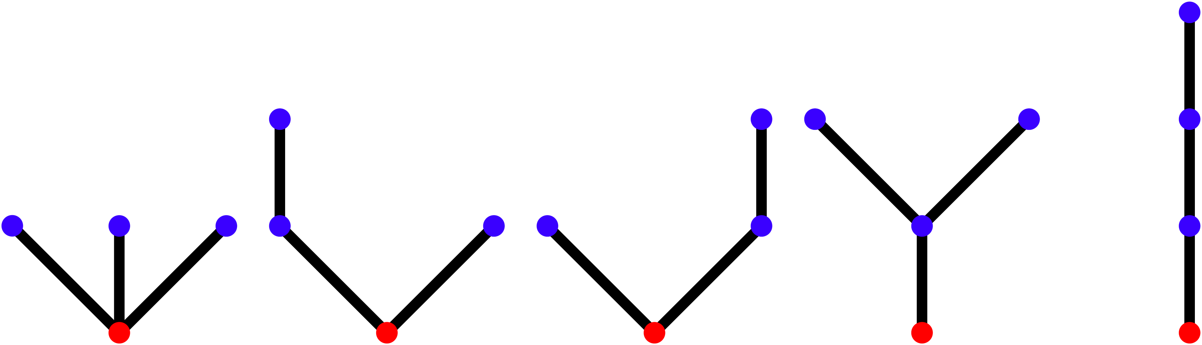 les 5 arbres planaires enracinés à 3 arètes